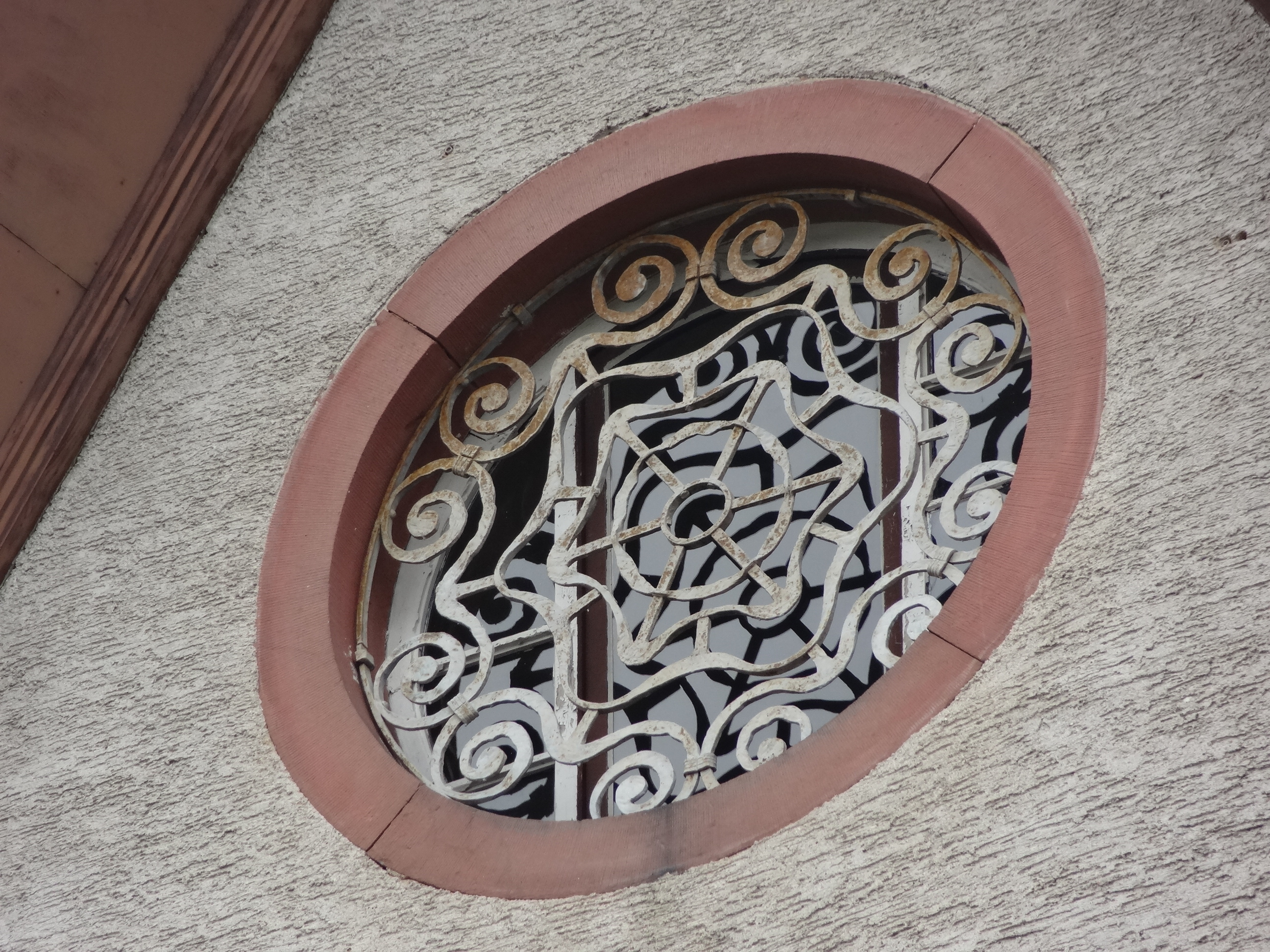 Haus Haardteck, Herdweg 79 in Darmstadt